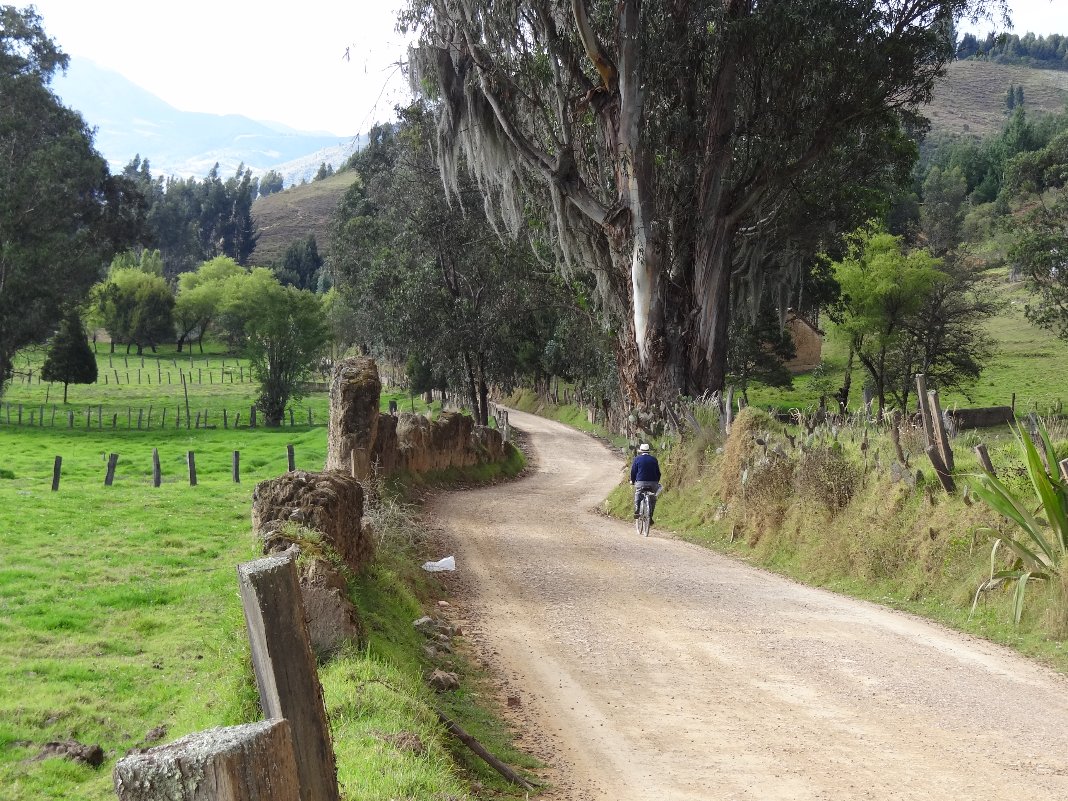 Vía carreteable en el área rural del municipio de Floresta, departamento de Boyacá, Colombia.